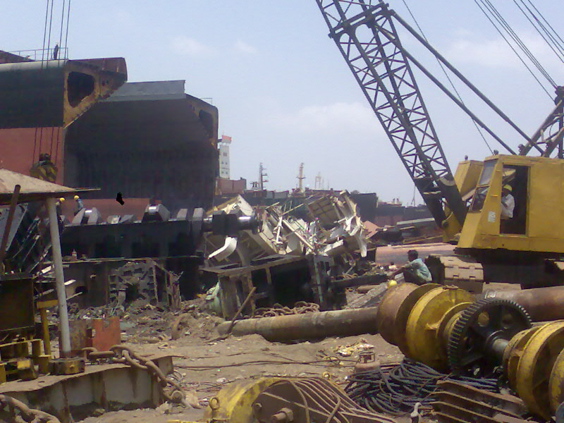 Alang ship breaking yard